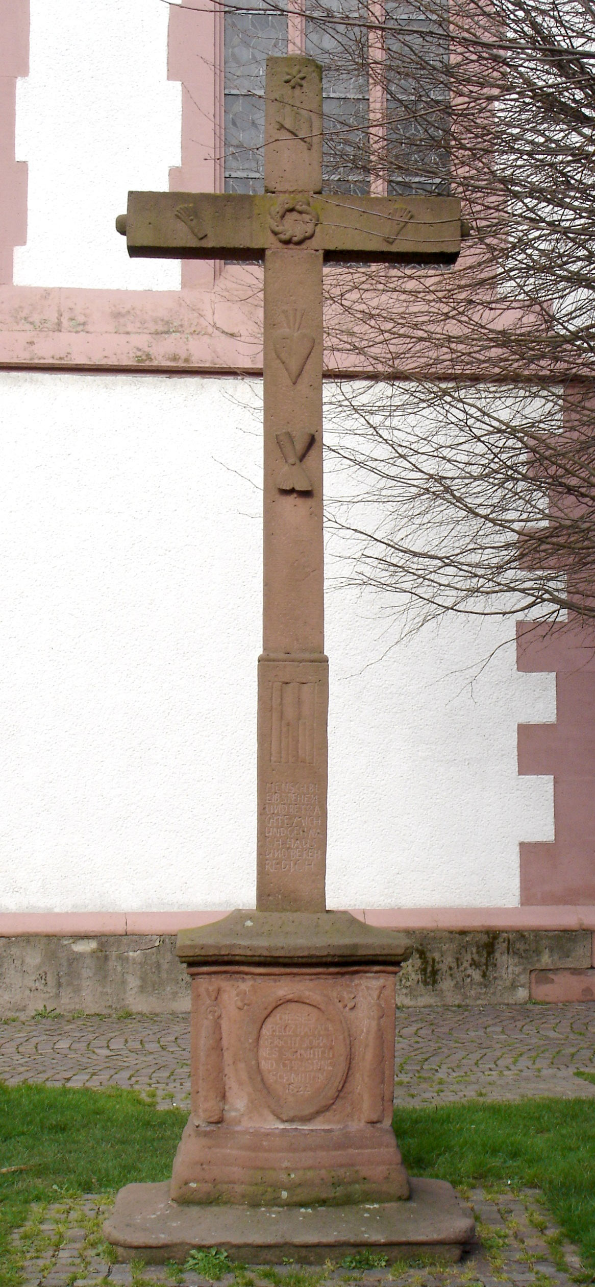 Kreuz aus Rotsandstein in Mörlenbach/Deutschland